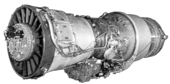 Pratt & Whitney J57 turbojet.